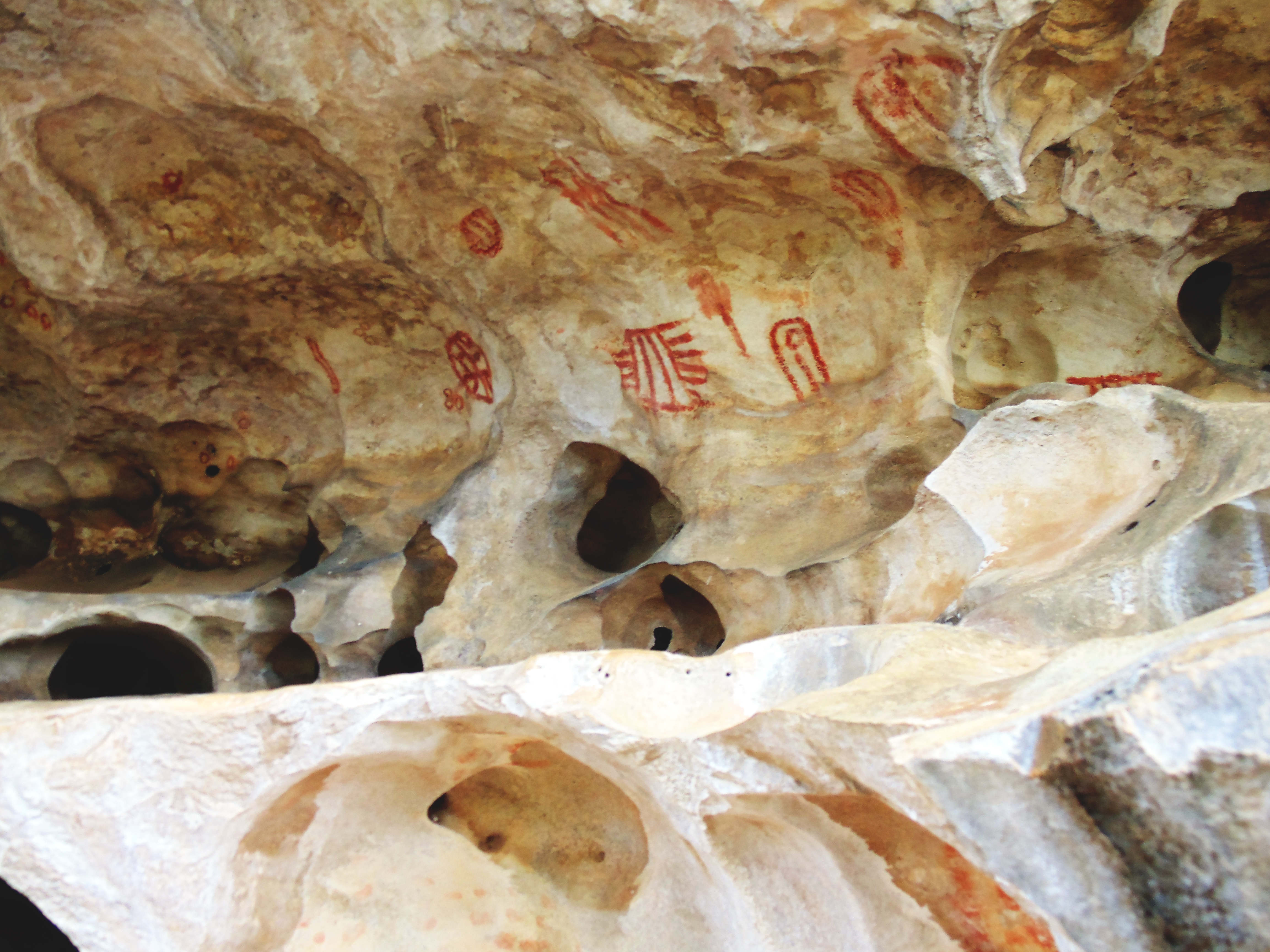 O Lajedo de Soledade recebe cerca de 7 mil visitantes por ano.